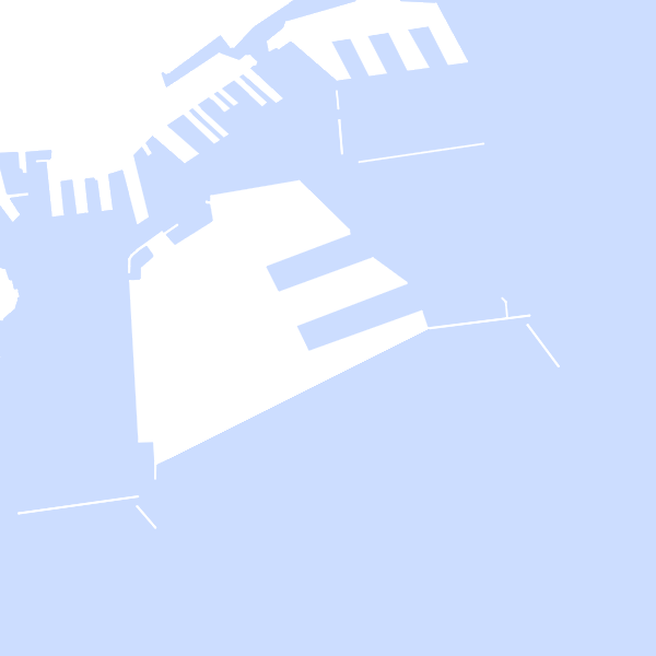 最終的な第1期ポートアイランド構想図